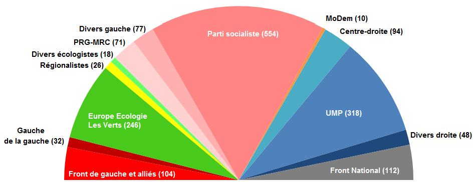 Répartition nationale (métropolitaine) des sièges après le second tour des élections régionales de 2010, par parti/famille politique